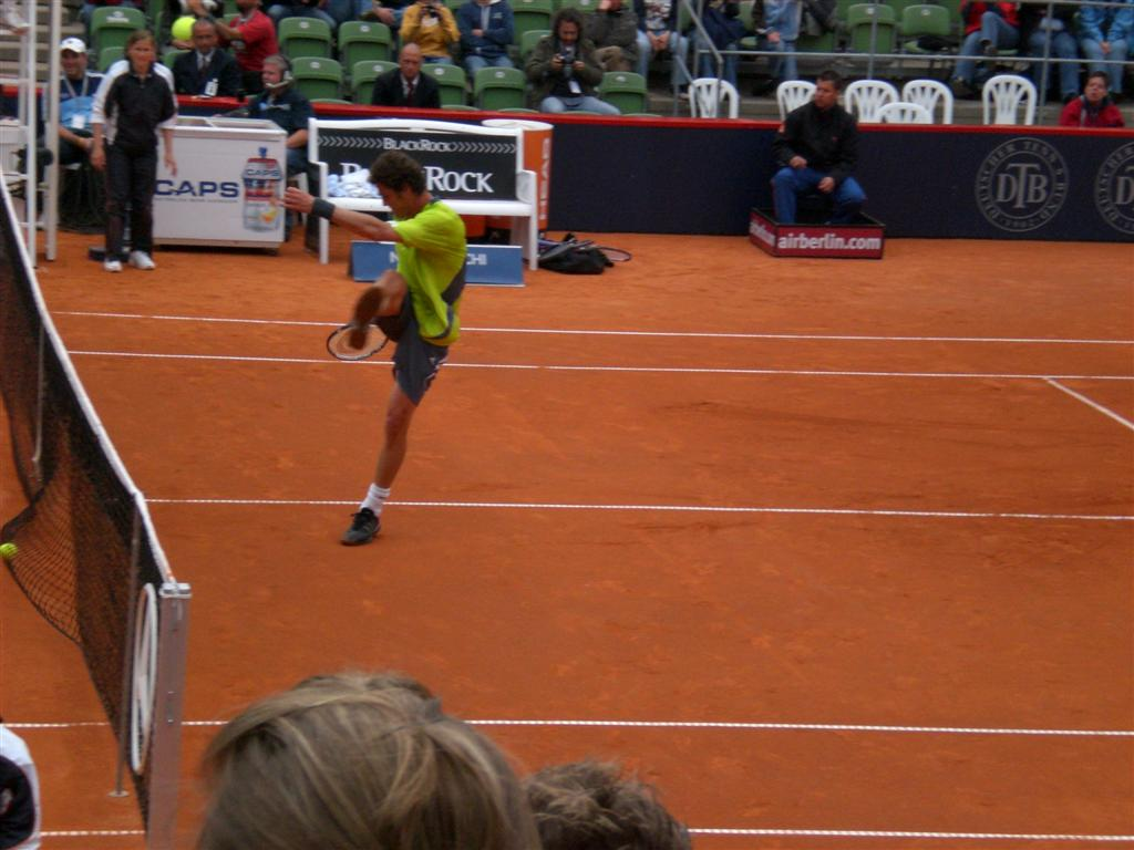 Марат Сафин Автор: HSV Дата: 14.05.2007